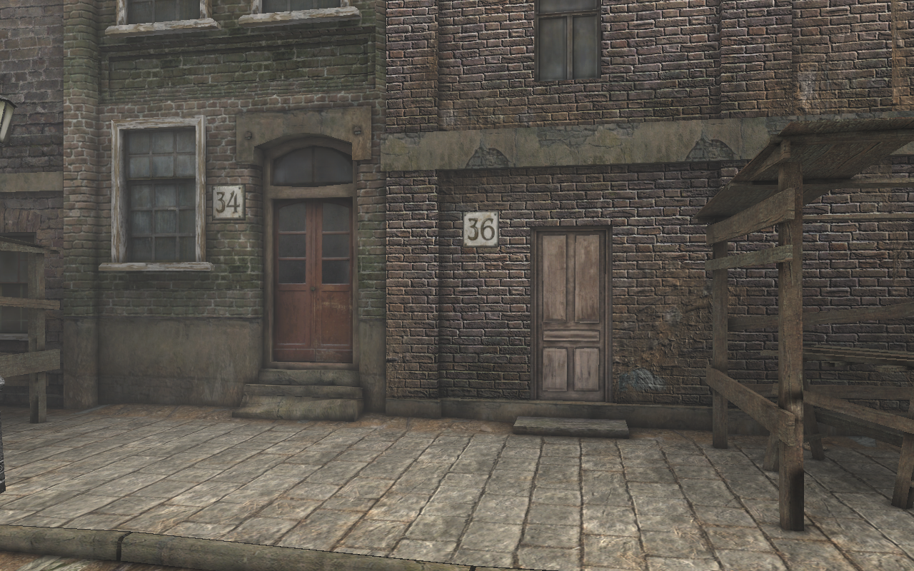 Capture d'écran du jeu Sherlock Holmes contre Jack l'Éventreur. Capture réalisée devant le 36, Middlesex en vue à la première personne (le joueur incarne le personnage qu'il contrôle).